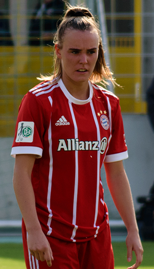 Jill Roord